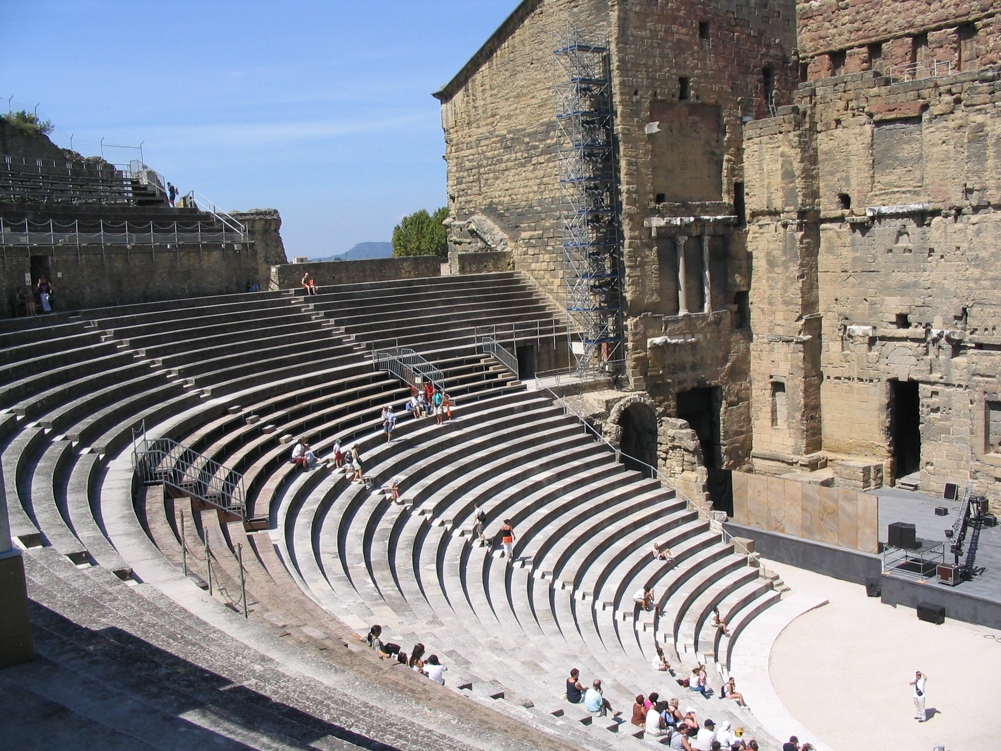 Römisches Theater in Orange